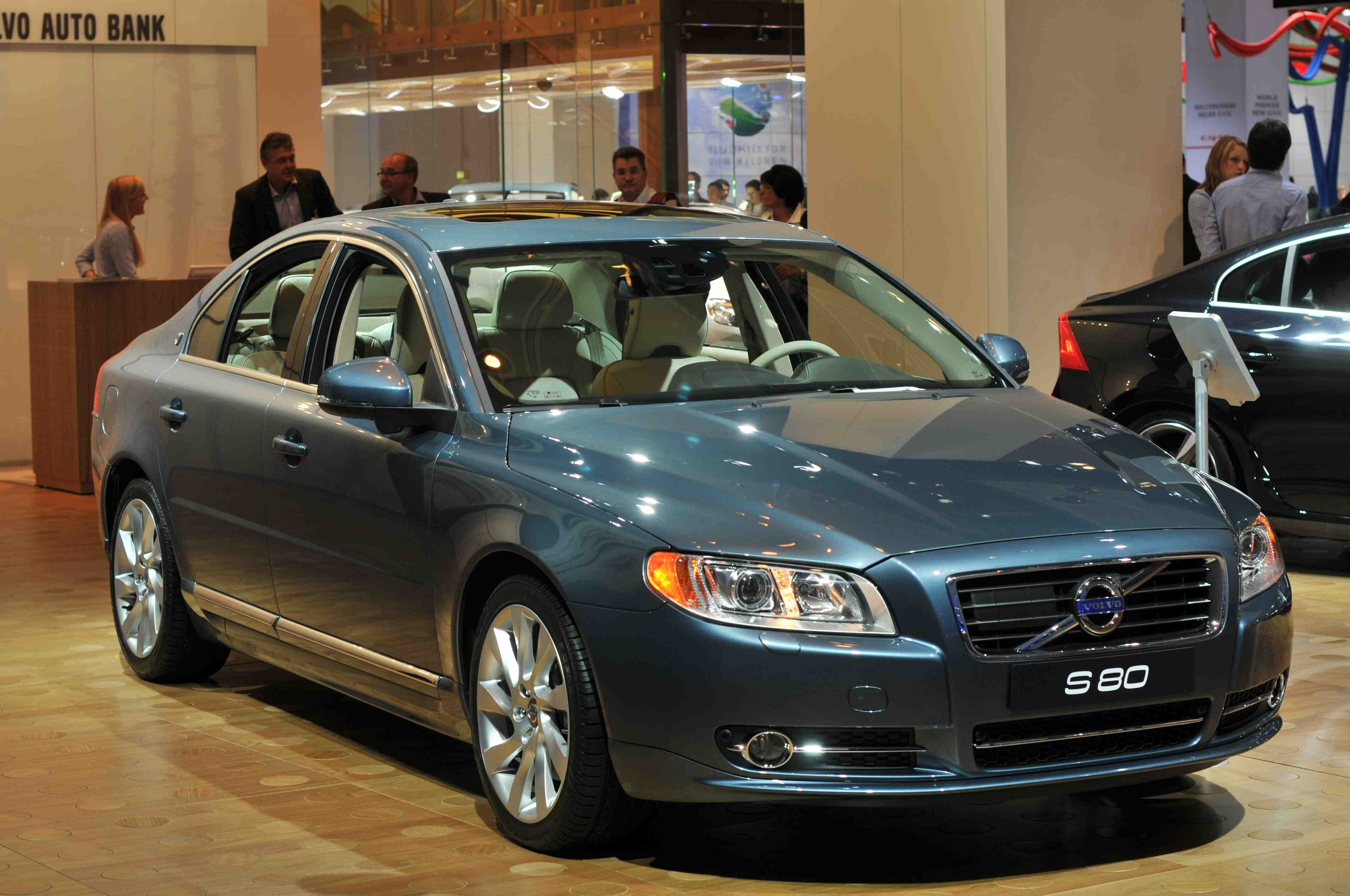 IAA 2011 - Internationale Automobilausstellung in Frankfurt/Main